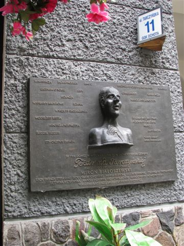 Miron Białoszewski(1922-1983)'s house = 11, Tarczyńska St., Warsaw (Poland)